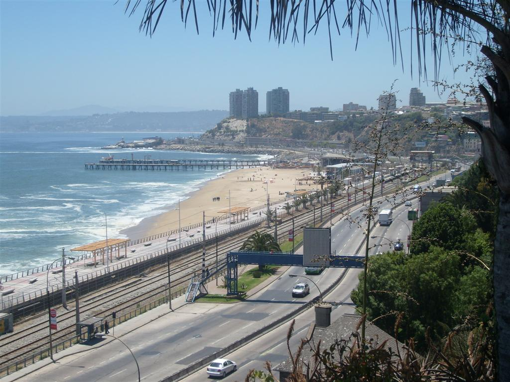 Vista Avda. España en dirección a Viña del Mar en Valparaíso, tomada desde la universidad santa maria.